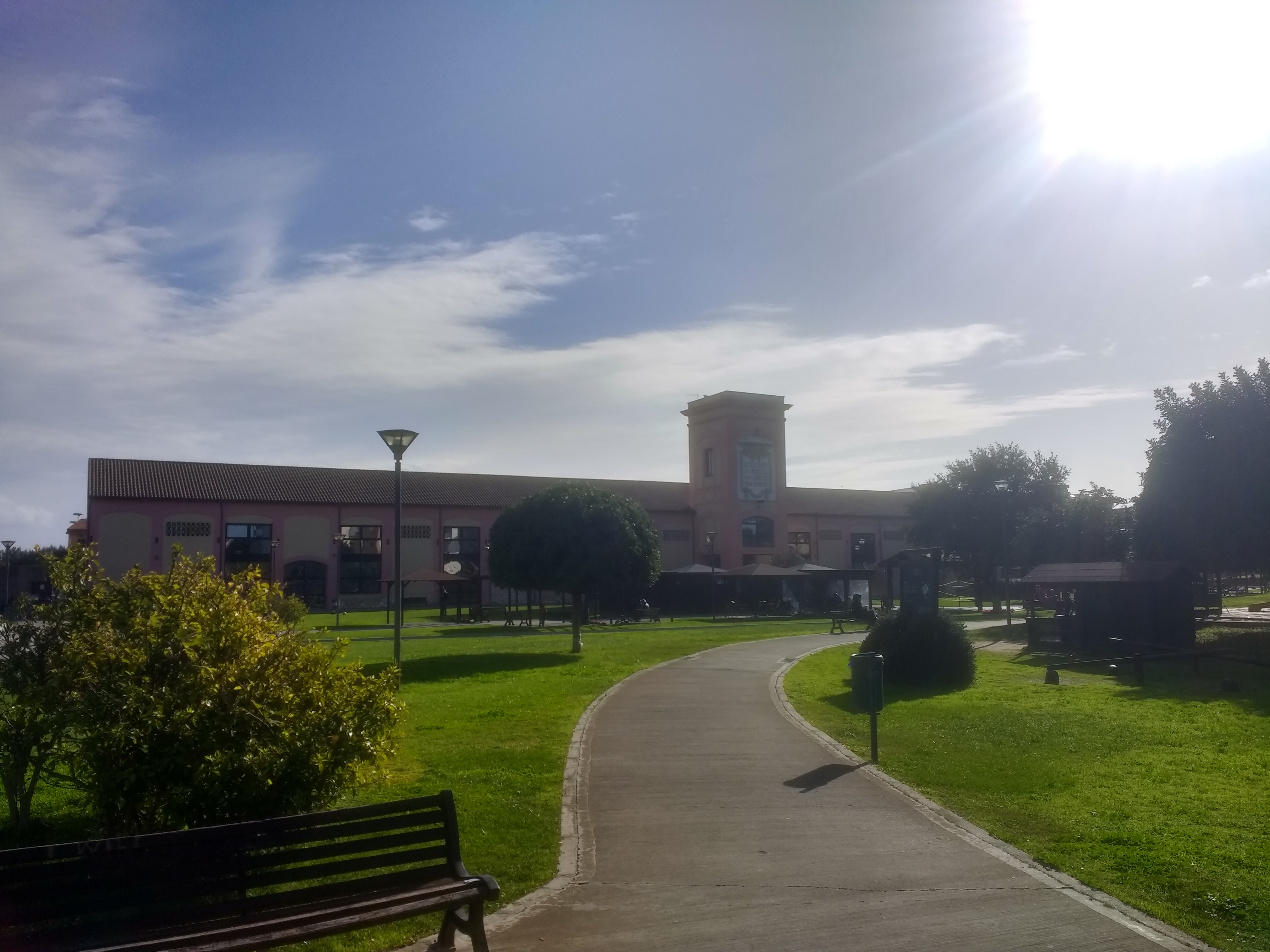 Foto scattata a Pirri nel dicembre 2019